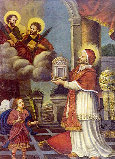 Painting from SS Cosma e Damiano.